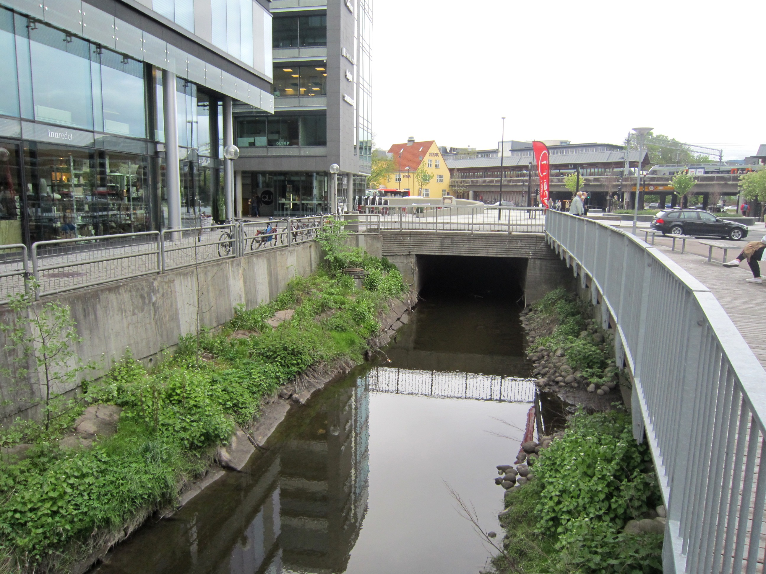 Hoffselva